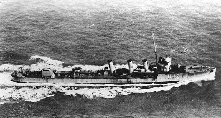 Der britische Zerstörer HMS PASLEY